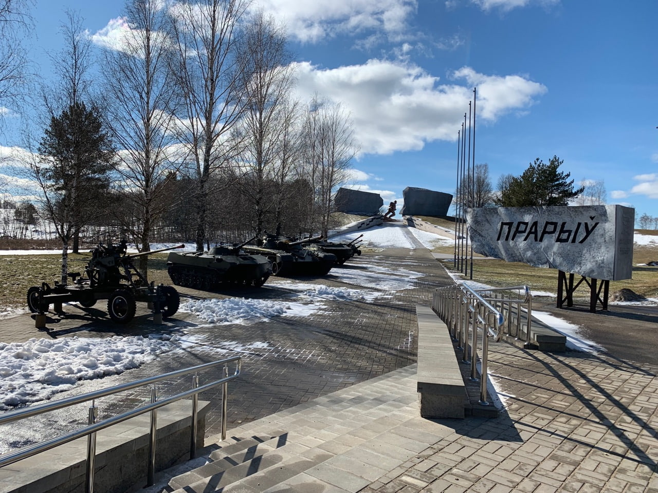 Мемарыяльный комплекс